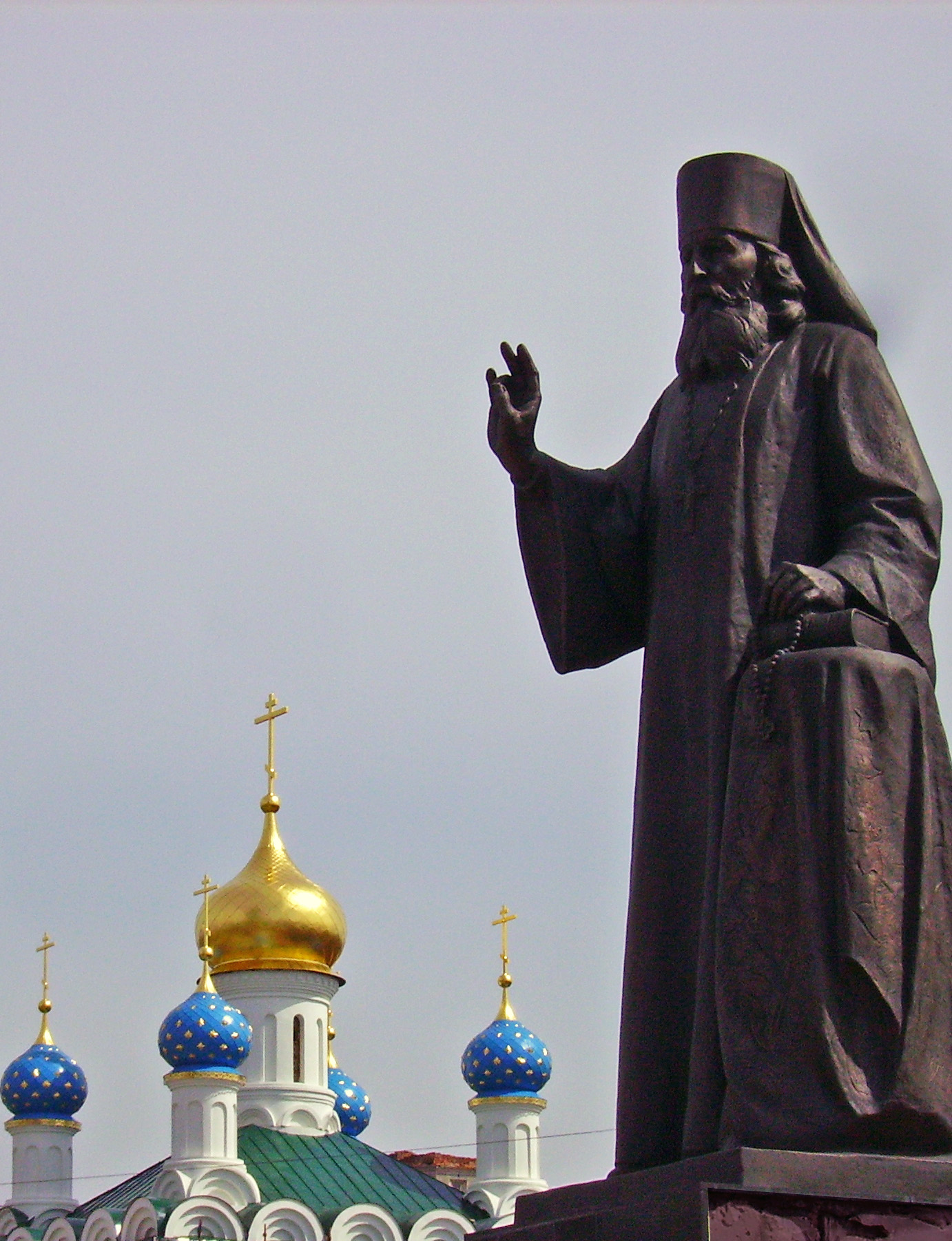 Выкса. Памятник преподобному Варнаве, основателю Иверского монастыря